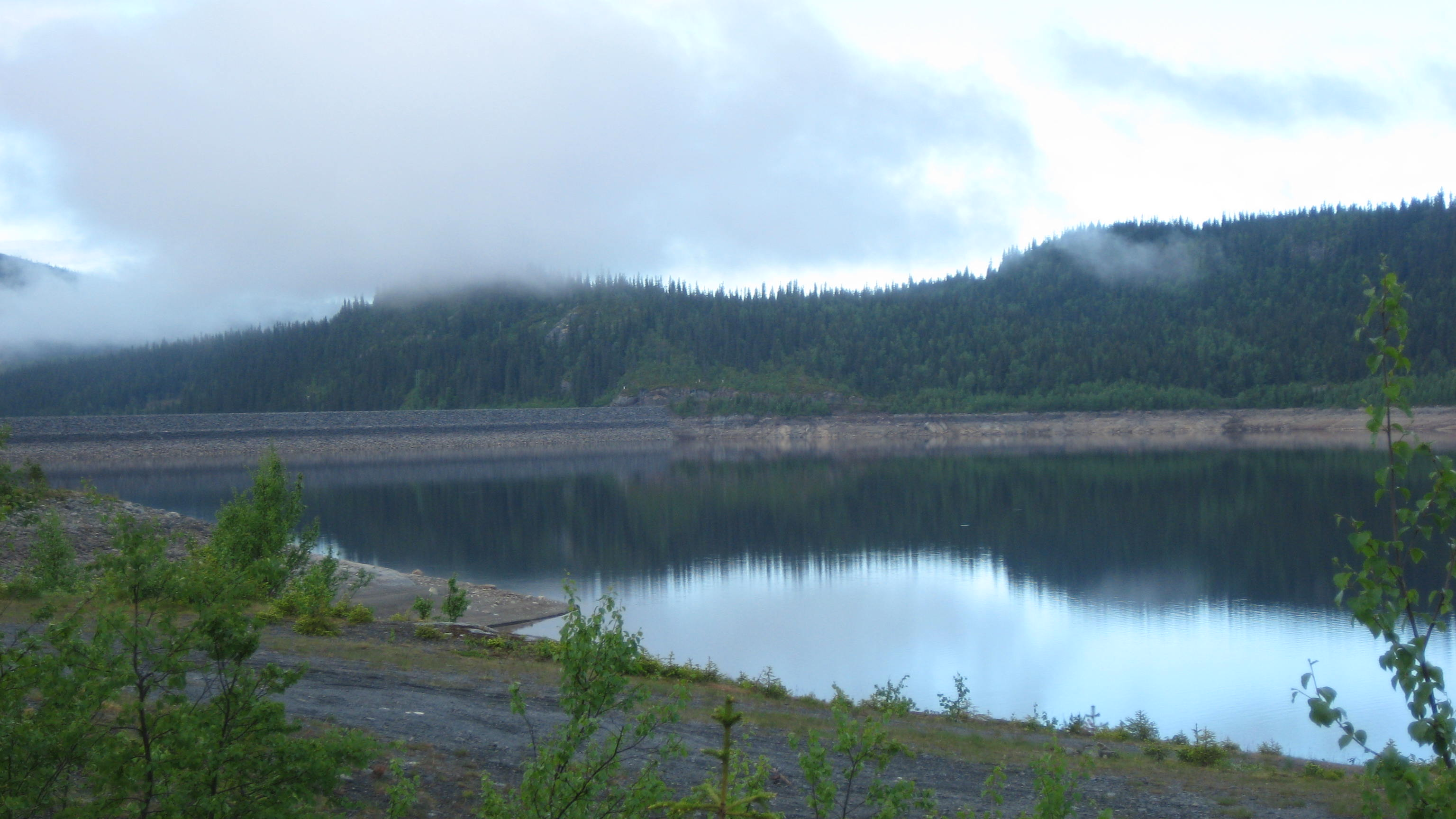 Dokkfløyvatnet i Torpa